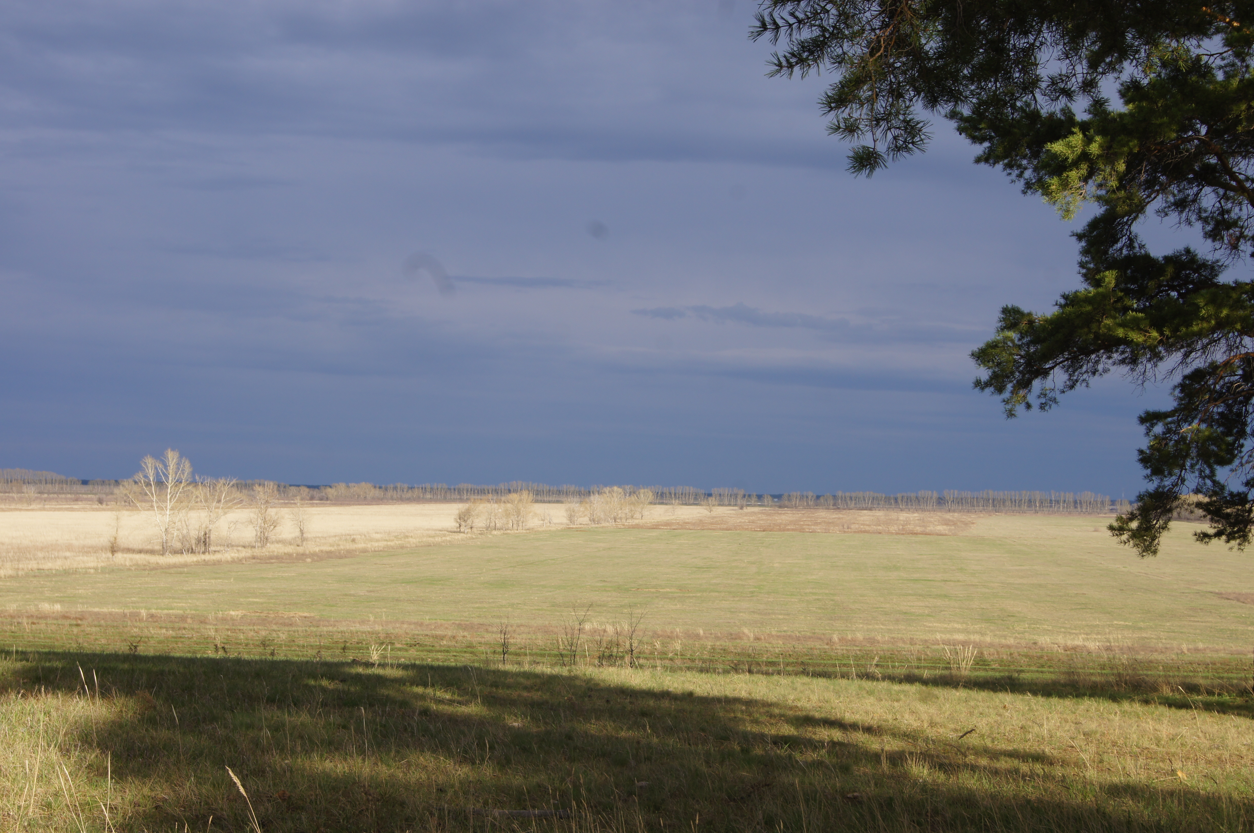 Жилой дом, построенный Криваксиными.